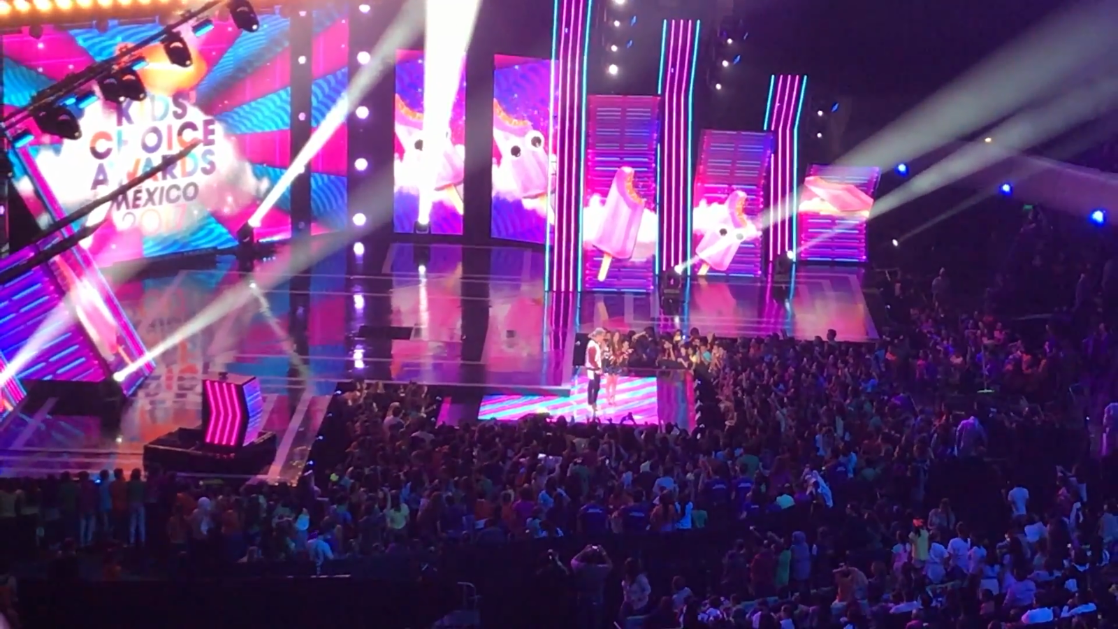 Escenario de los Kids' Choice Awards México 2017